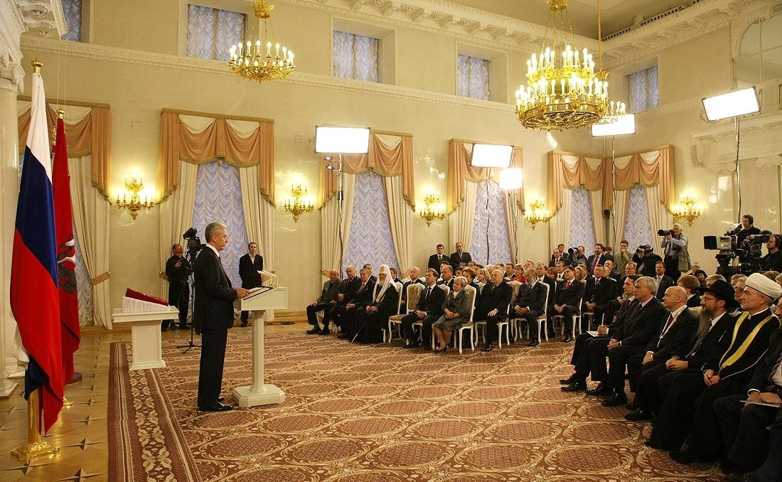 Церемония инаугурации мэра Москвы Сергея Собянина